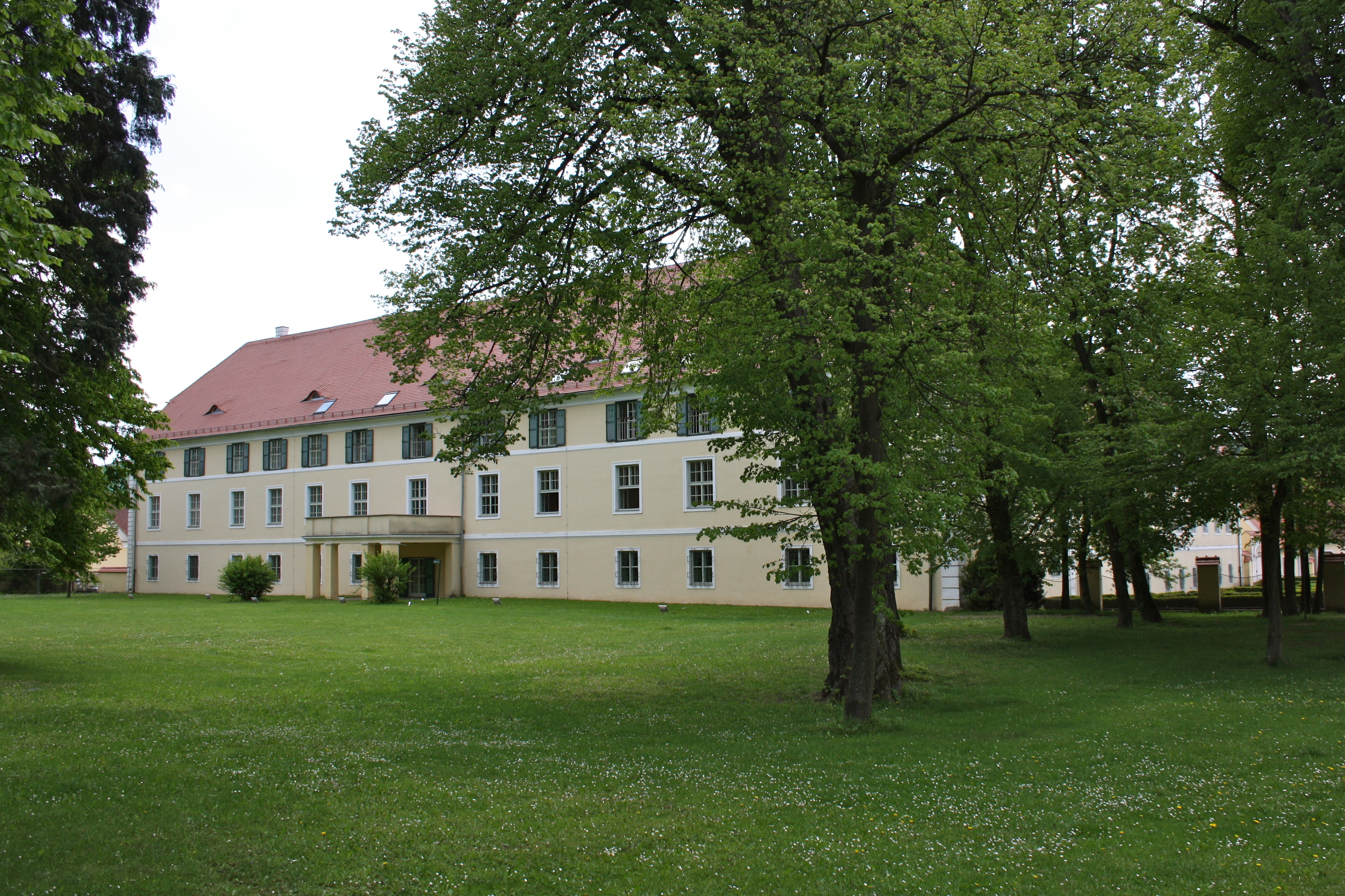 Ehem. Schloss Batthyány - heute Landesberufsschule